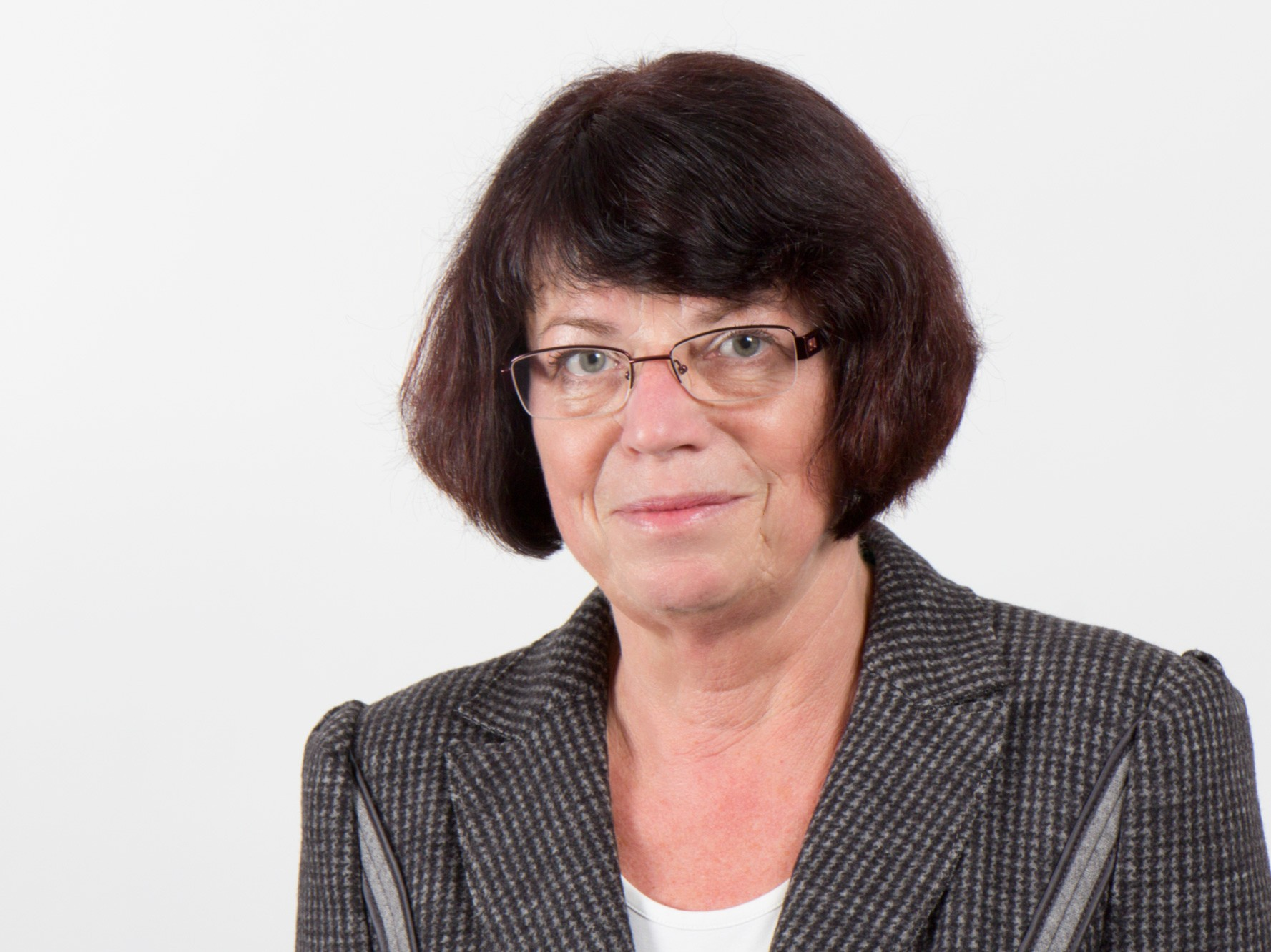 Angelika Klein (* 21. Juli 1951 in Garnsdorf) ist eine deutsche Politikerin (Die Linke) und Mitglied im Landtag Sachsen-Anhalts. Wikipedia im Landtag – Sachsen-Anhalt 13./14. Dezember 2012 in MagdeburgDieses Foto wurde im Rahmen des Projektes „Wikipedia im Landtag“ erstellt. The making of this document was supported by the Community-Budget of Wikimedia Germany. The making of this work was supported by Wikimedia Austria. For other files made with the support of Wikimedia Austria, please see the category Supported by Wikimedia Österreich. Personality rights warningAlthough this work is freely licensed or in the public domain, the person(s) shown may have rights that legally restrict certain re-uses unless those depicted consent to such uses. In these cases, a model release or other evidence of consent could protect you from infringement claims.